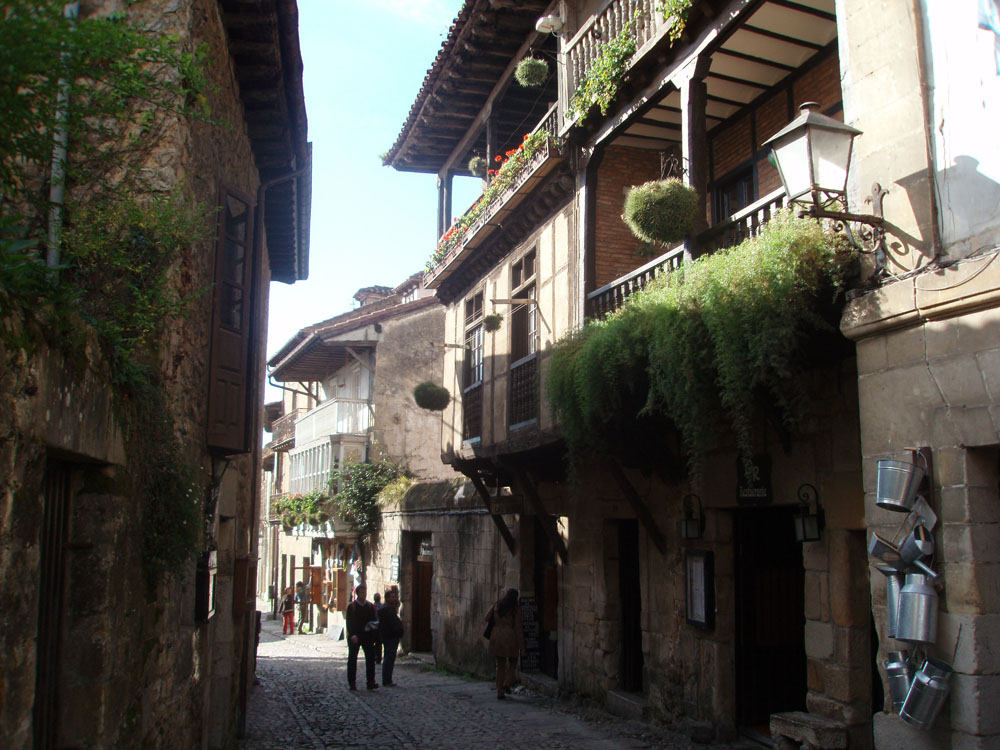 Calle de Santillana del Mar (Cantabria, España).